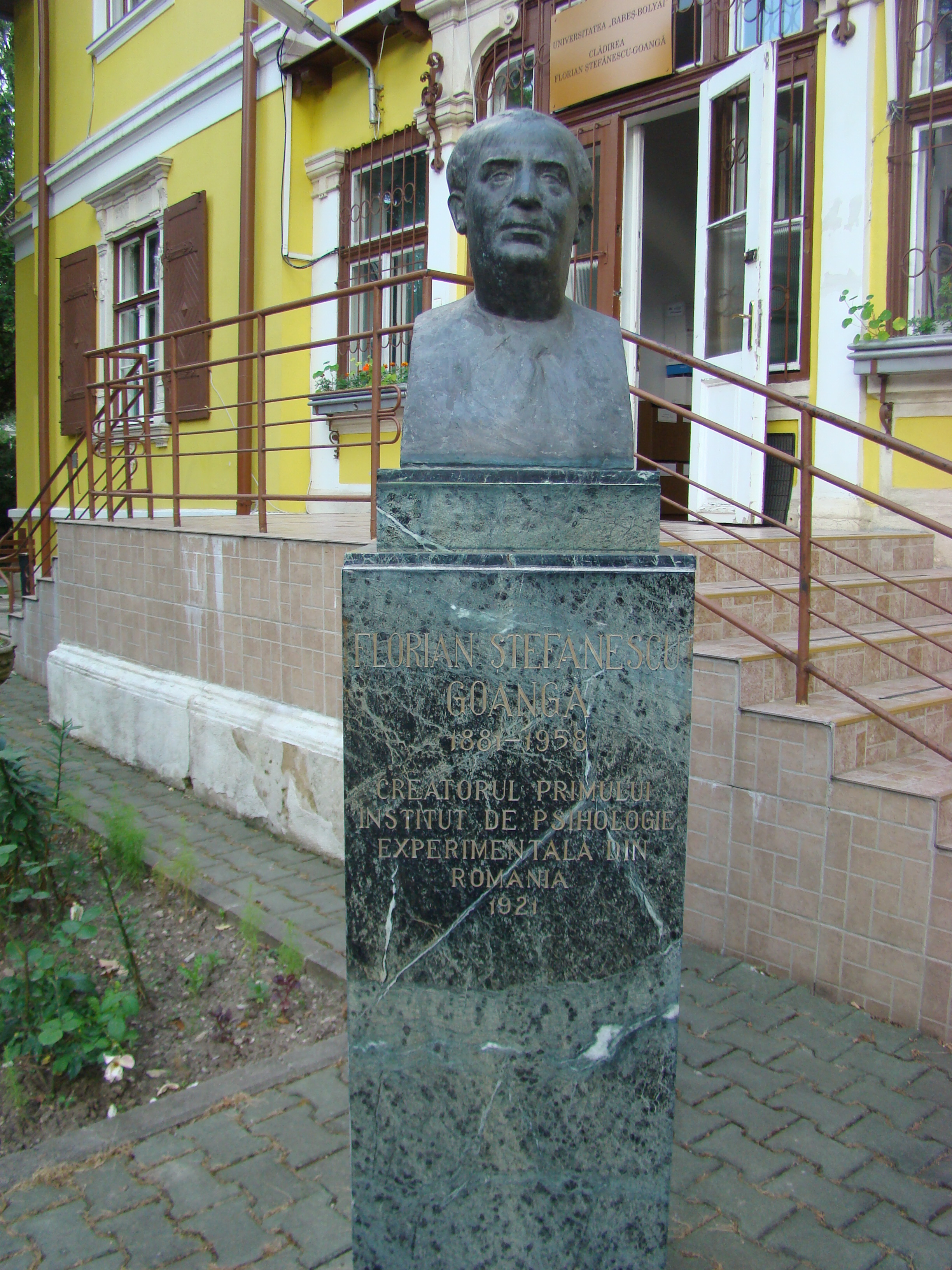 Clădire monument istoric, str.Republicii, nr. 37 (în prezent Institutul de psihologie)